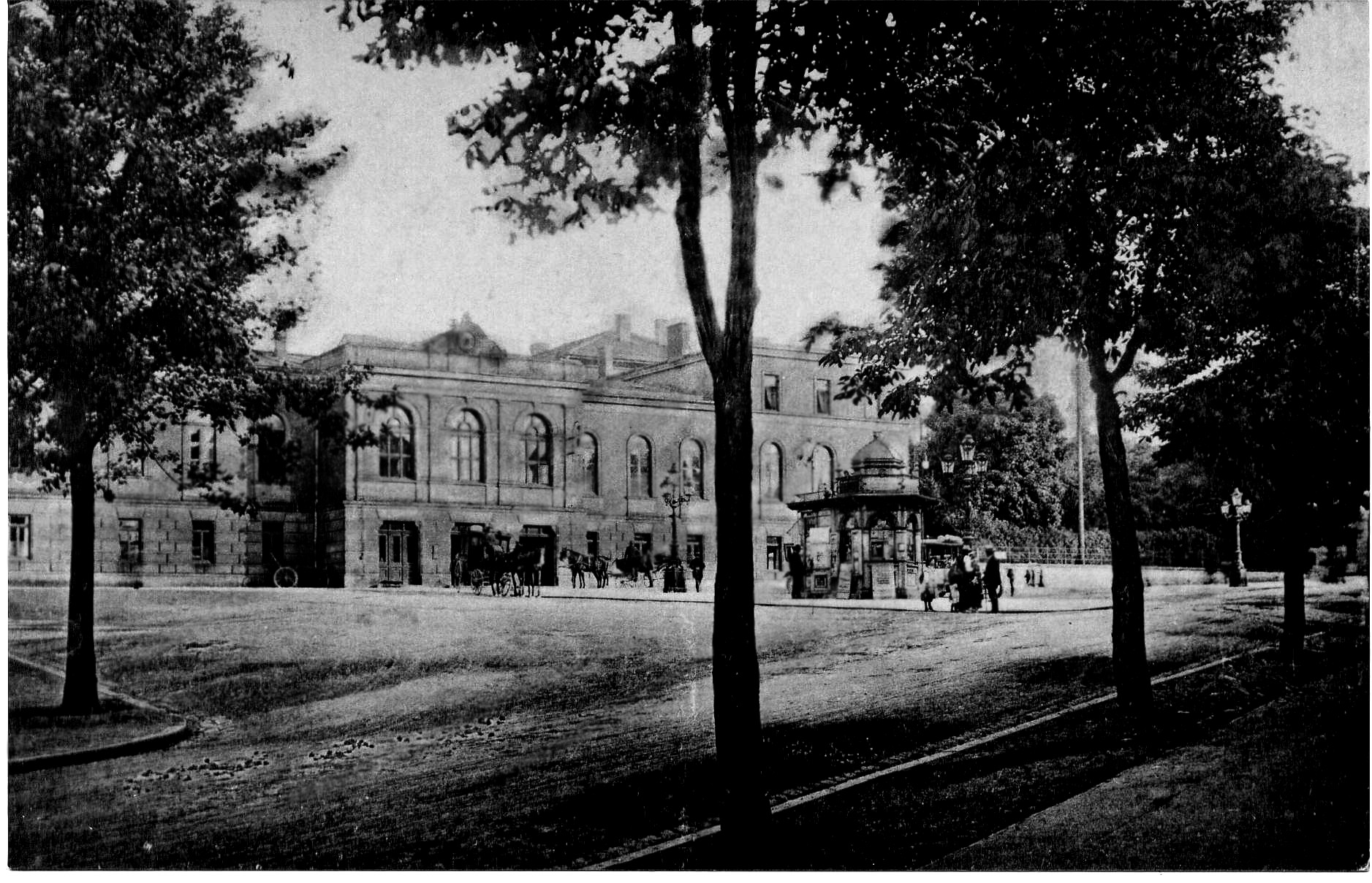 Alter Bahnhof in Kempten, historische Ansicht mit Kutschen